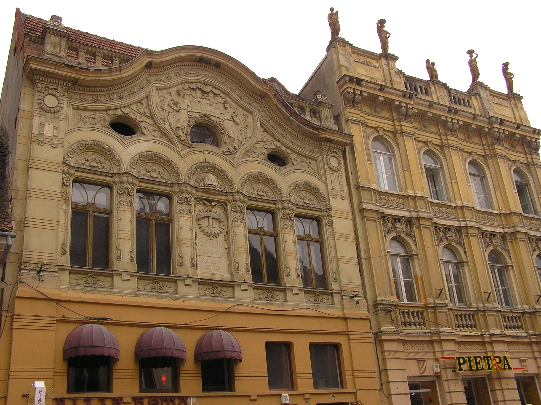 Hausfassade in der Strada Republicii („Purzengasse“), Brașov, Rumänien